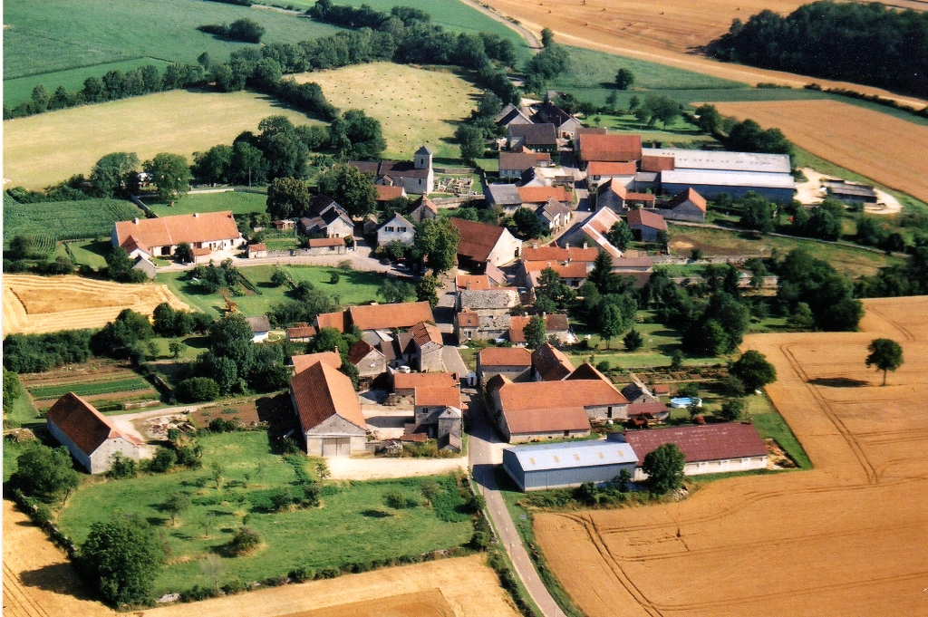 Source Seine vu du ciel